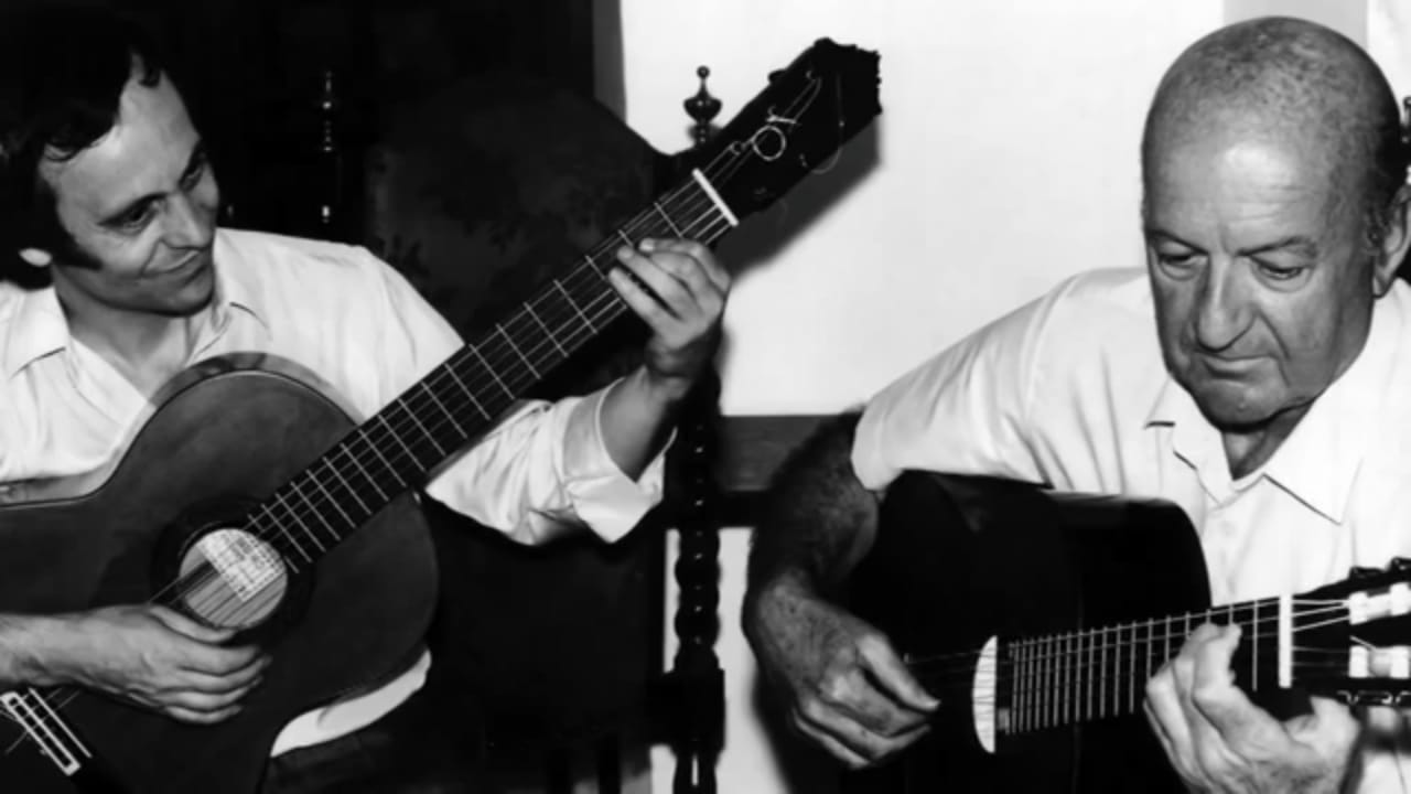 Paco Peña y Eduardo Falú ensayando.